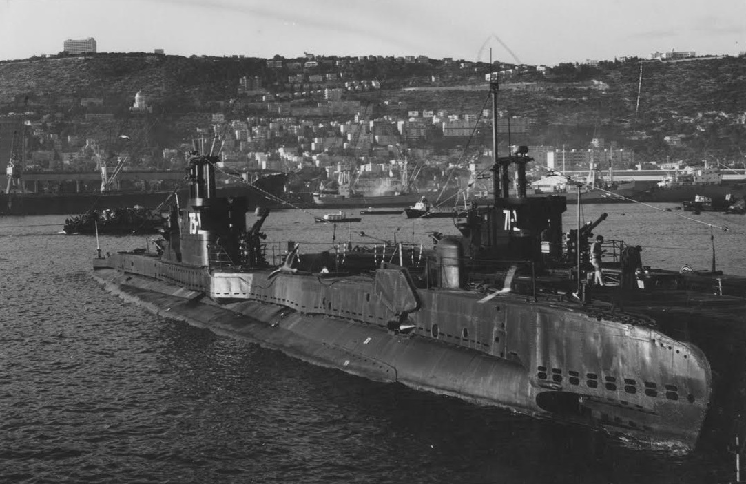 הצוללות אח"י תנין צ-71 מואח"י רהב צ-73 ברציף הצוללות בנמל חיפה